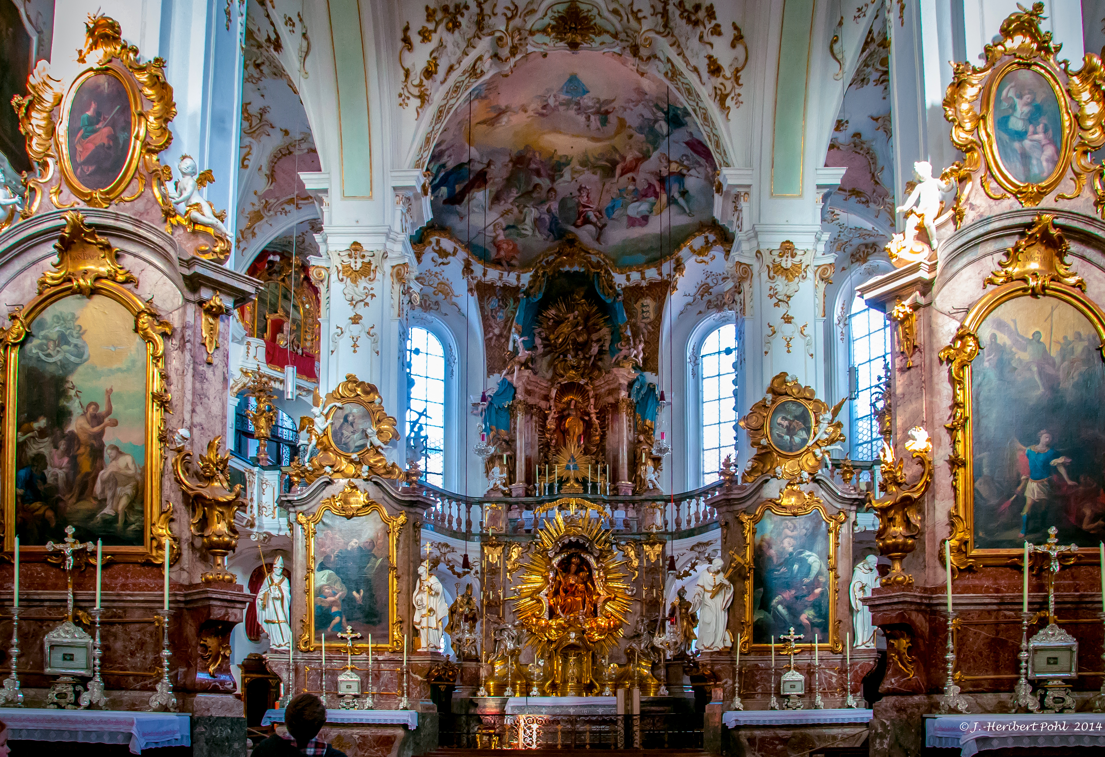 Die heutige Wallfahrtskirche entstand zwischen 1420 und 1430. Sie wurde mehrfach umgebaut und neu errichtet. Grund waren die Schweden im 30 Jährigen Krieg und ein Brand bei dem sie vollkommen ausbrannte. Zum 300 jährigen bestehen wurde durch Johann Baptist Zimmermann, Ignaz Merani und Lorenz Sappel die Kirche in einen farbenfrohe Rokokosaal umgestaltet.